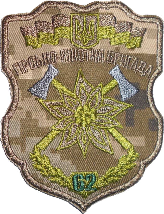 Нарукавний знак, 62 окрема гірськопіхотна бригада